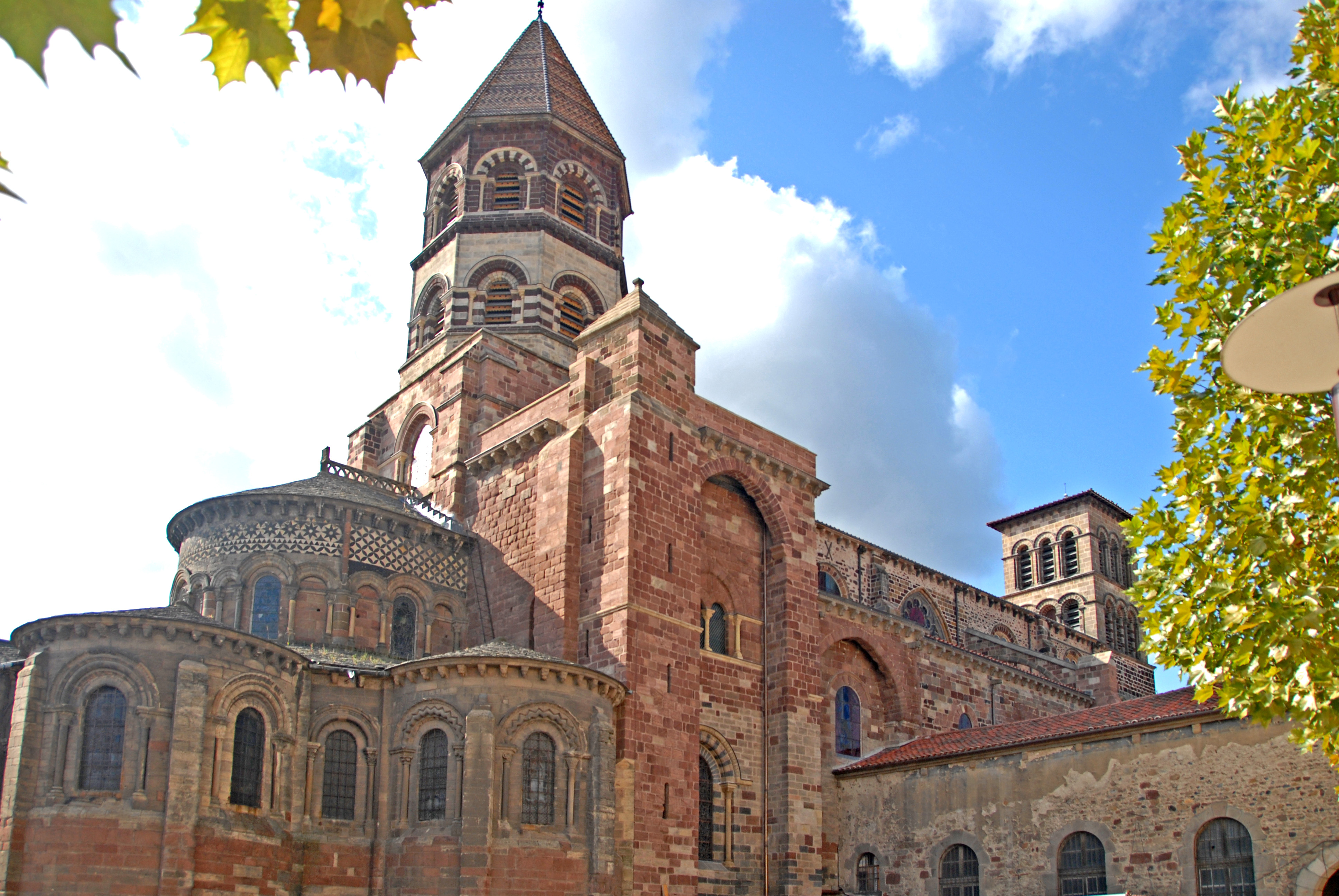 St.-Julien Brioude, Gesamtüberblick von N